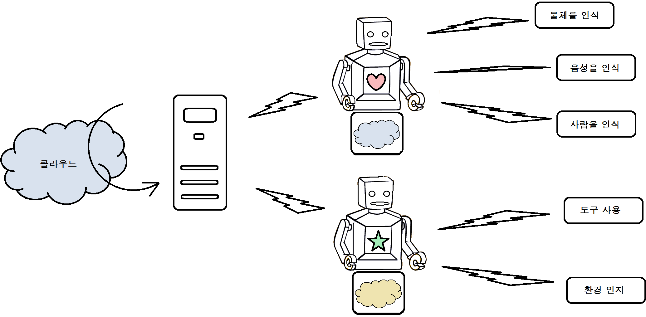 클라우드 로봇 유형3으로 클라우드 컴퓨팅을 통하여 자신의 환경을 계산, 변화하는 것에 대하여 로봇이 자동으로 재구성